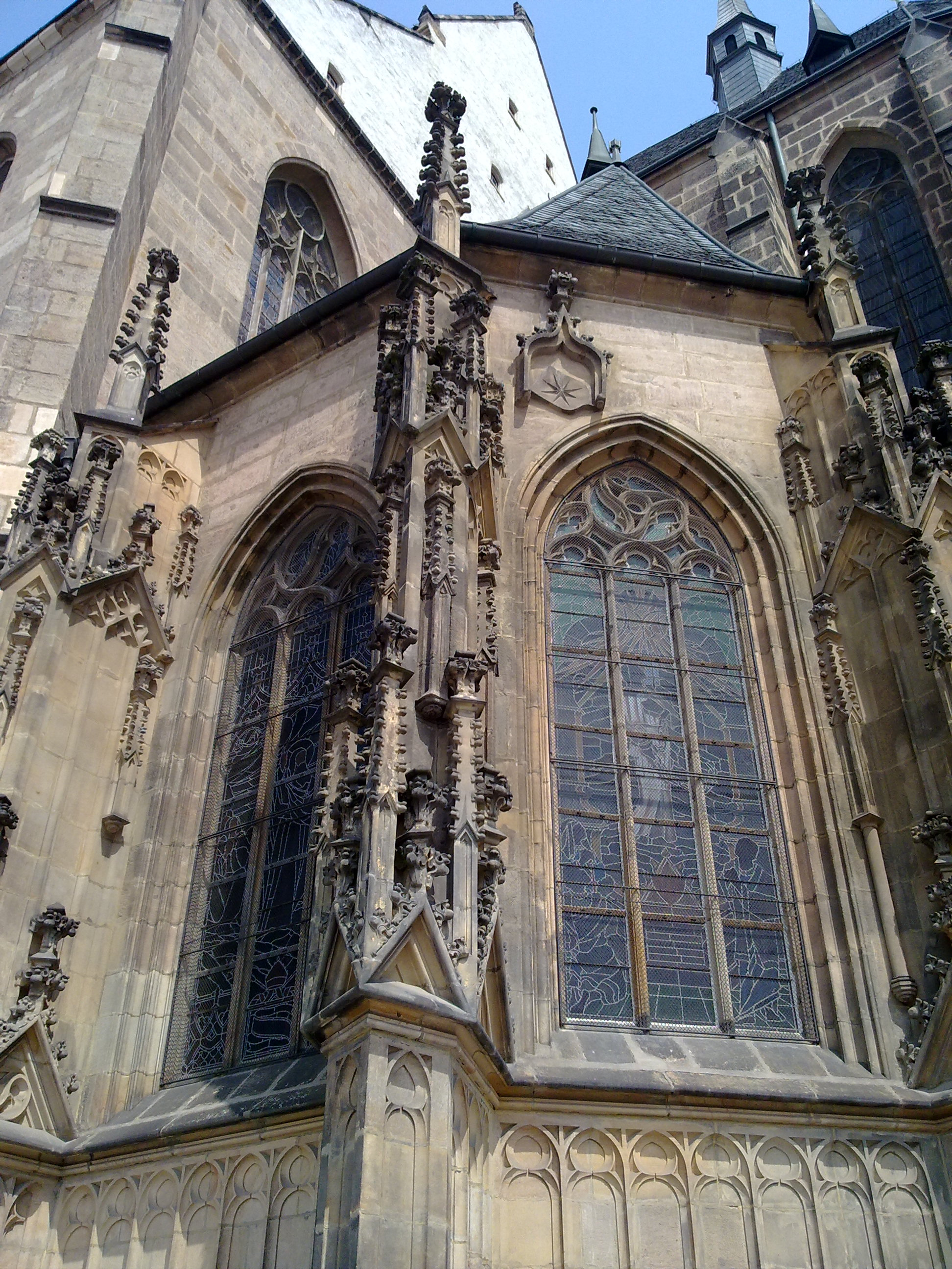 Fiála Šternberské kaple Katedrály svatého Bartoloměje v Plzni.